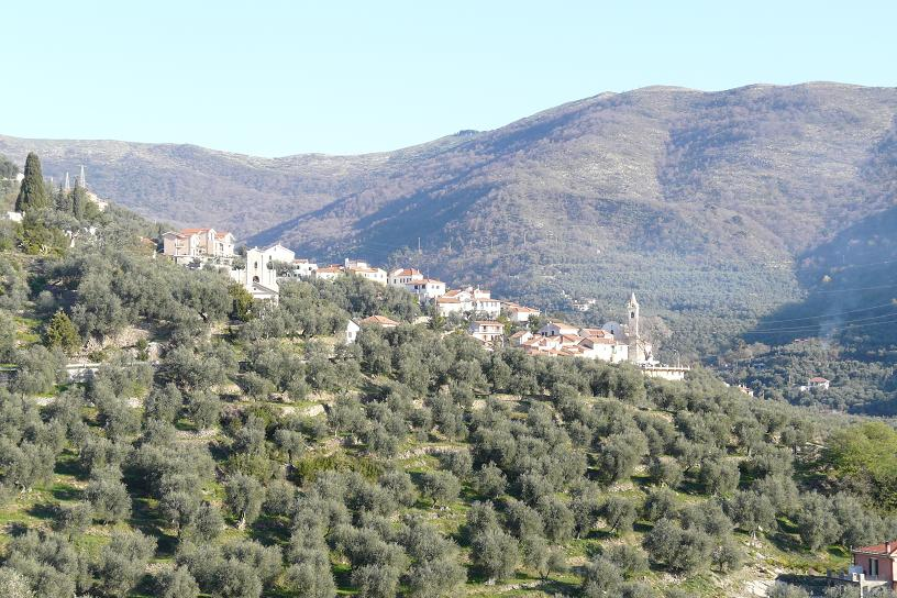 Diano Borello, Liguria, Italia